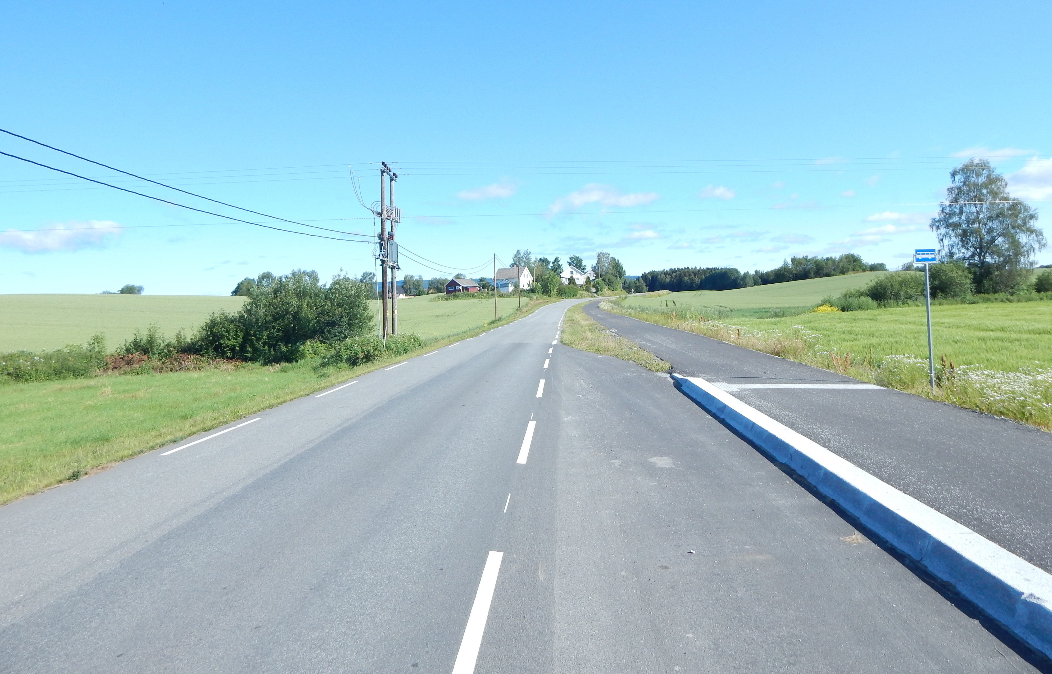 Dælidvegen (fykesvei 1806, tidl. 112)